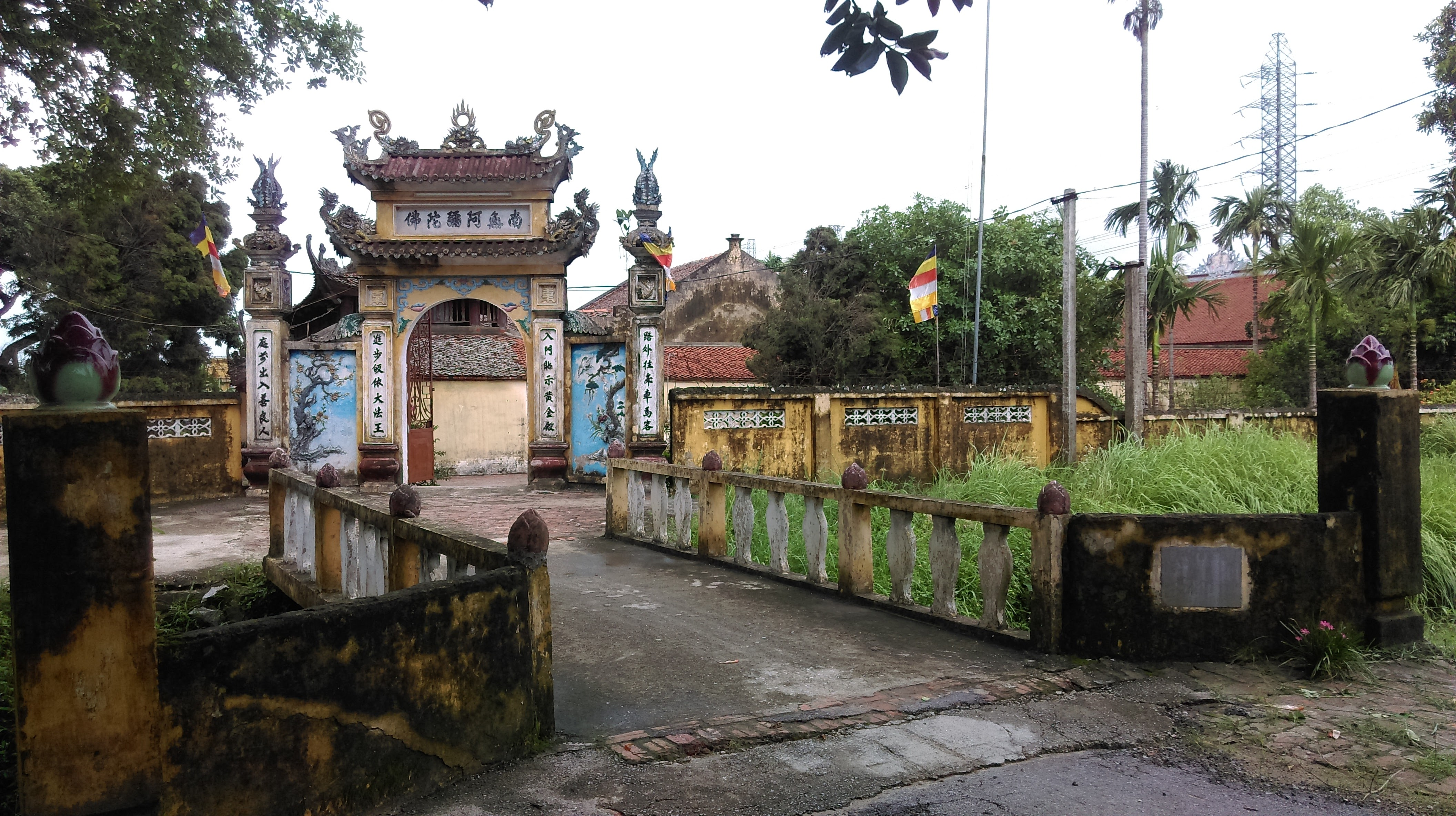 Chùa Pháp Vân, Văn Bình, Thường Tín, Hà Nội